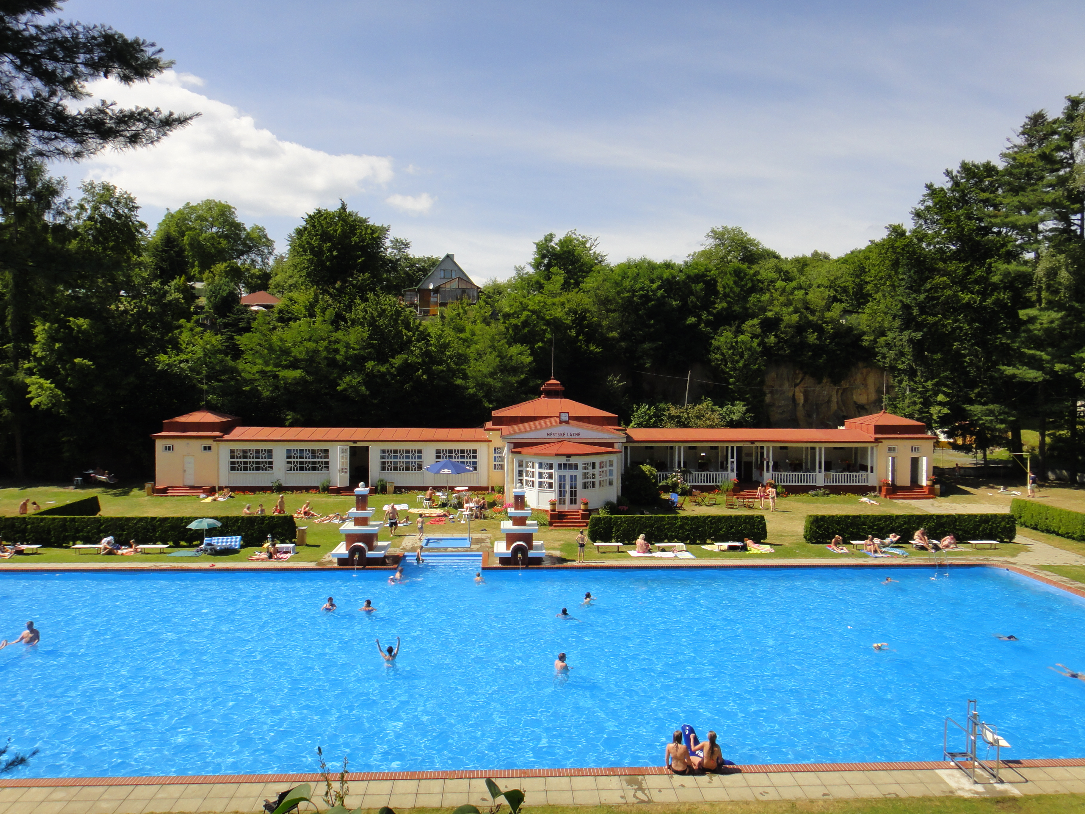 Městské lázně (Mšeno), Cinibulkova 372, Mšeno, Mšeno.